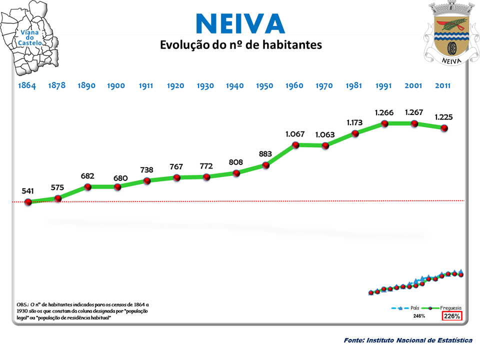 Censos 1864/2011